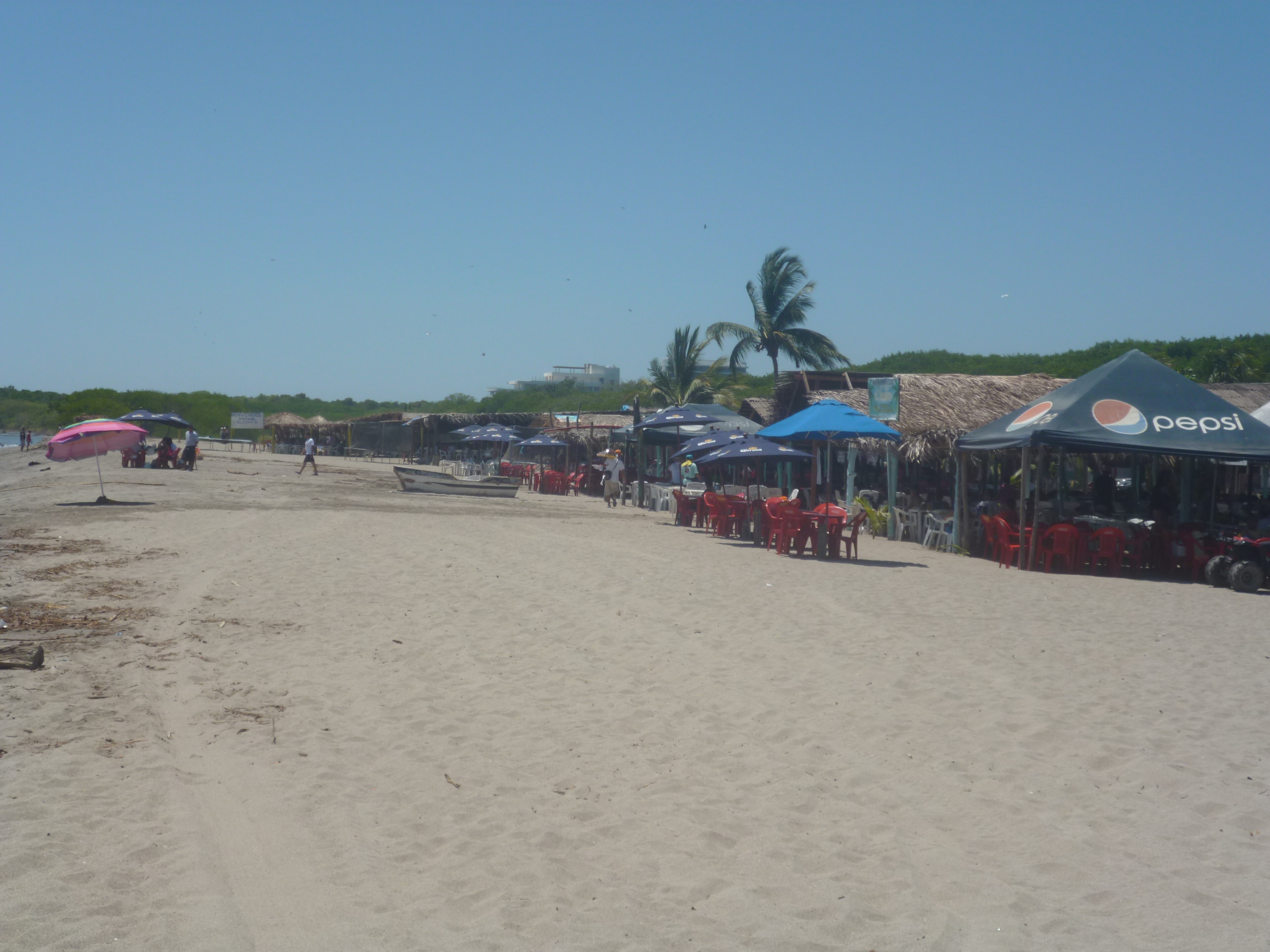 Ramadas